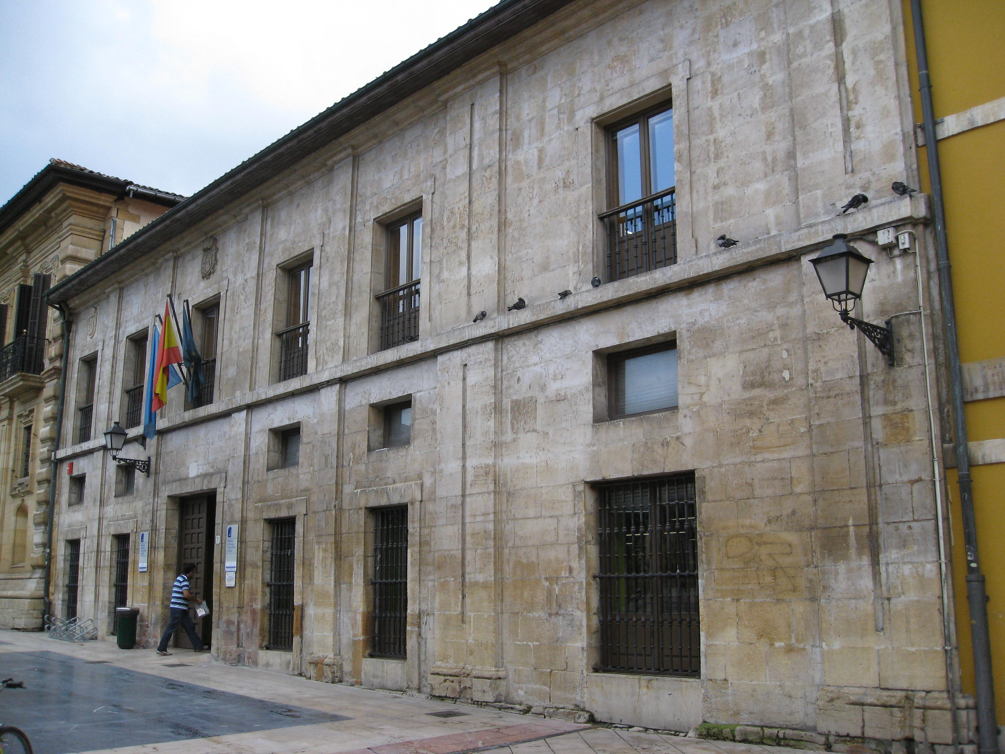 Biblioteca pública de Asturias, Oviedo, Asturias.